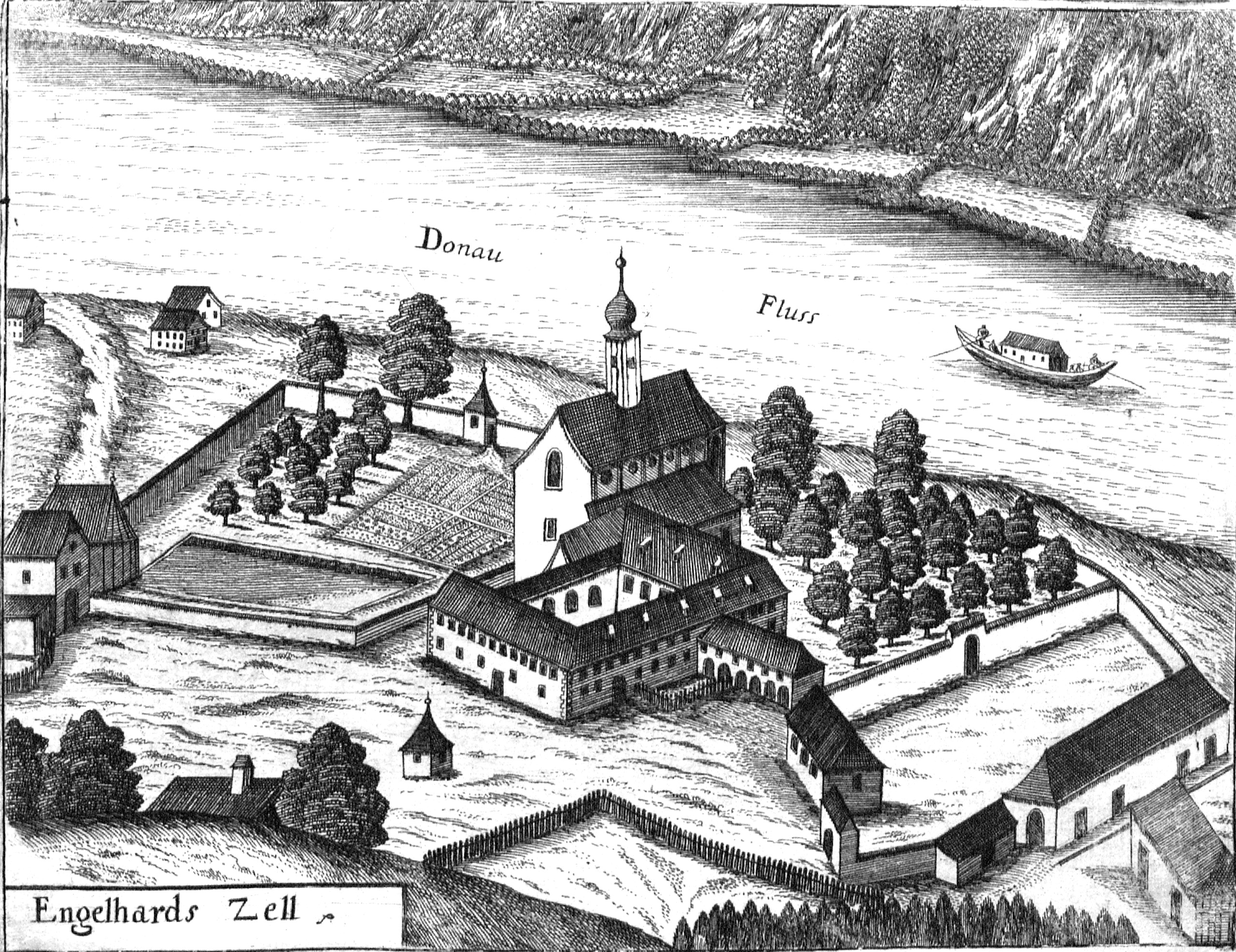 Engelhartszell an der Donau nach einem Stich von Georg Matthäus Vischer von 1674